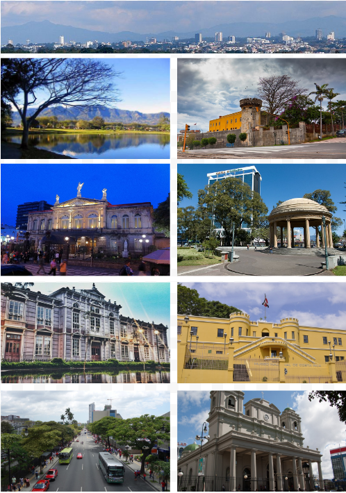 Foto-montaje de la ciudad de San José